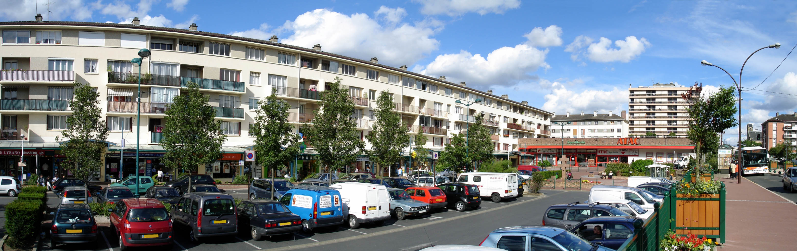 La place Charles-de-Gaulle à Franconville (Val-d'Oise), France